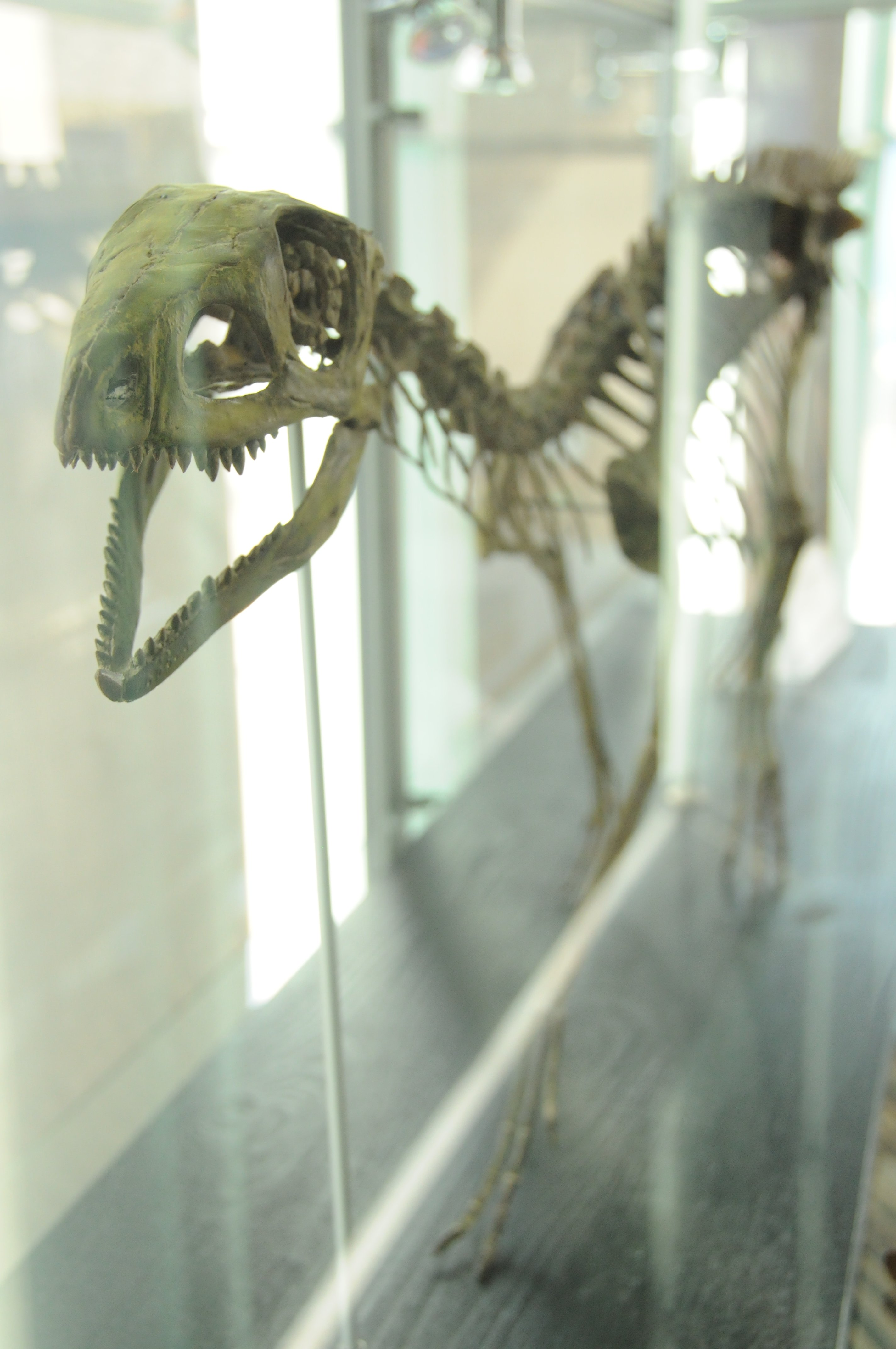 Szkielet Silesaurusa w dinoparku w Krasiejowie